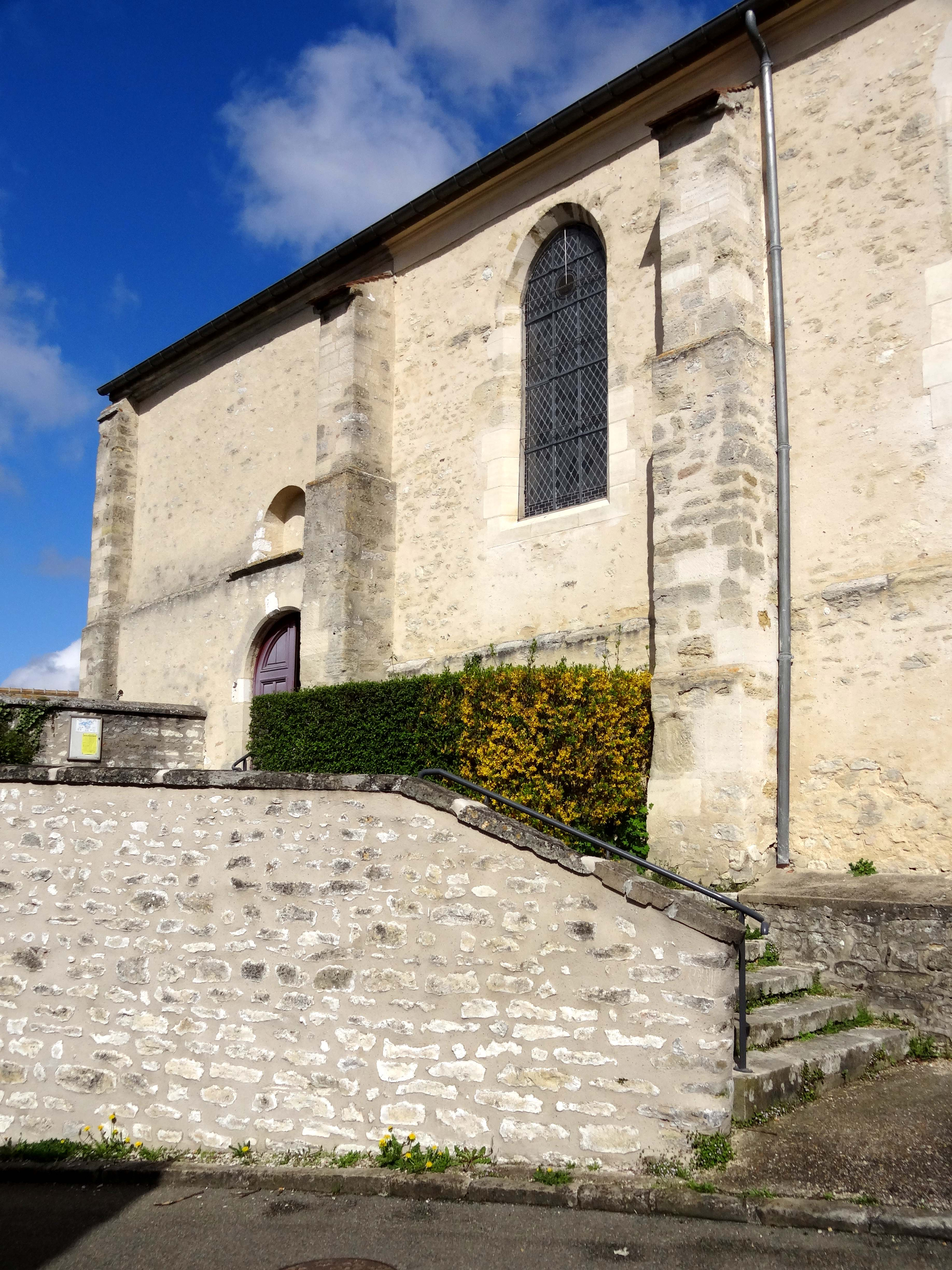 Église Saint-Martin de Follainville - voir titre.